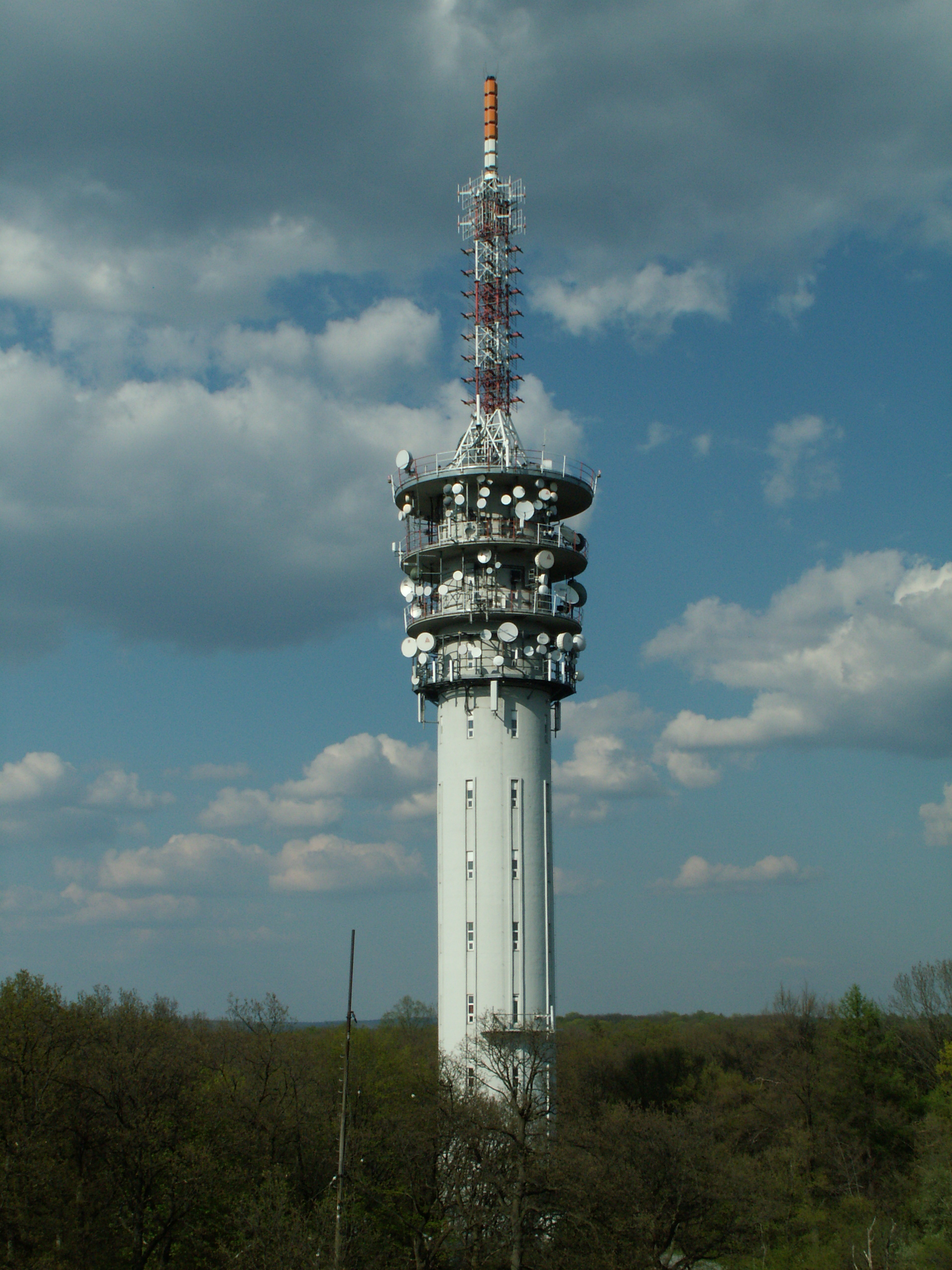 Vysílač na vrcholu kopce Hády, poskytující signál pro Brno a okolí. Fotografie byla pořízena z blízkého stožáru asi 15 m nad zemí.